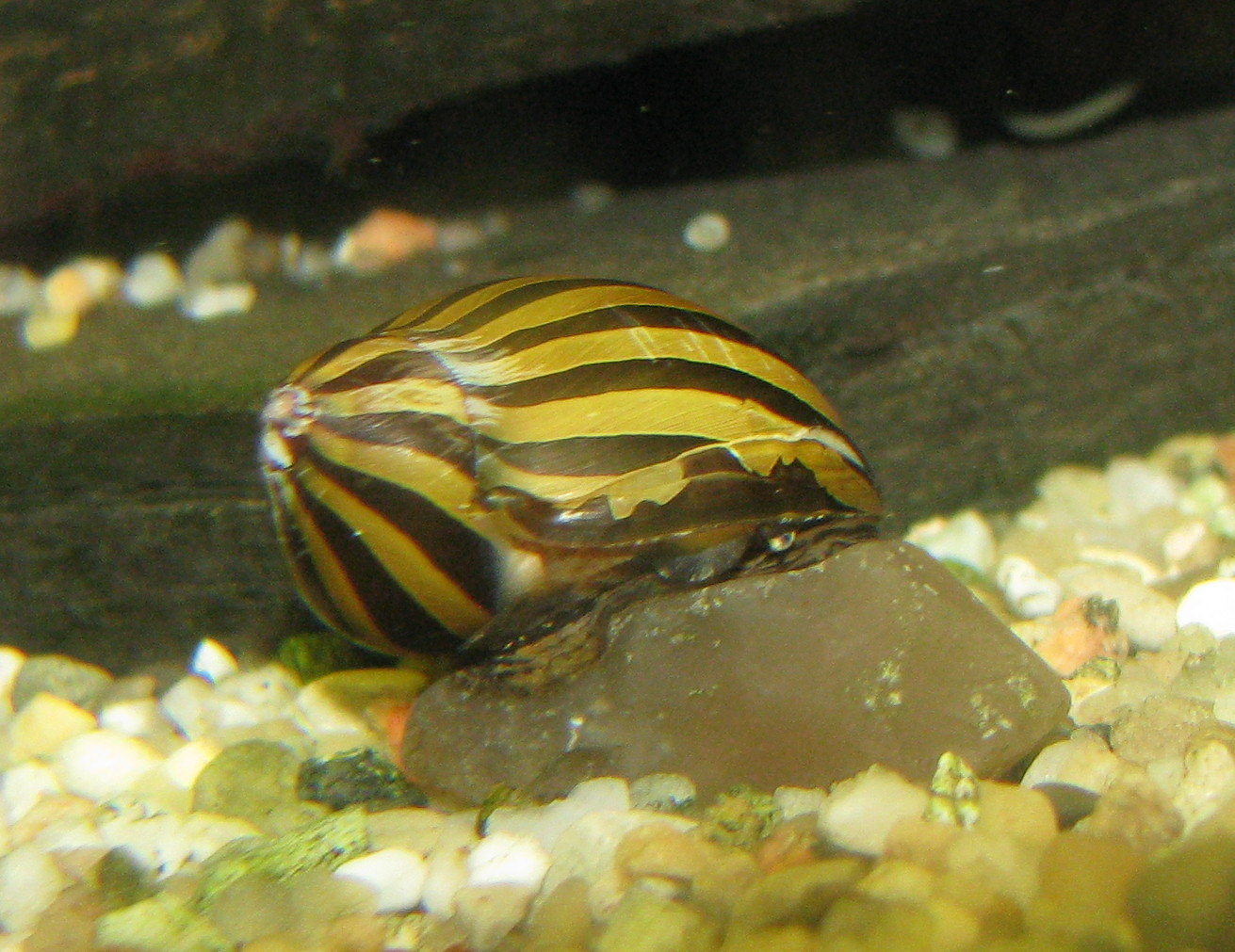 Zebrarennschnecke